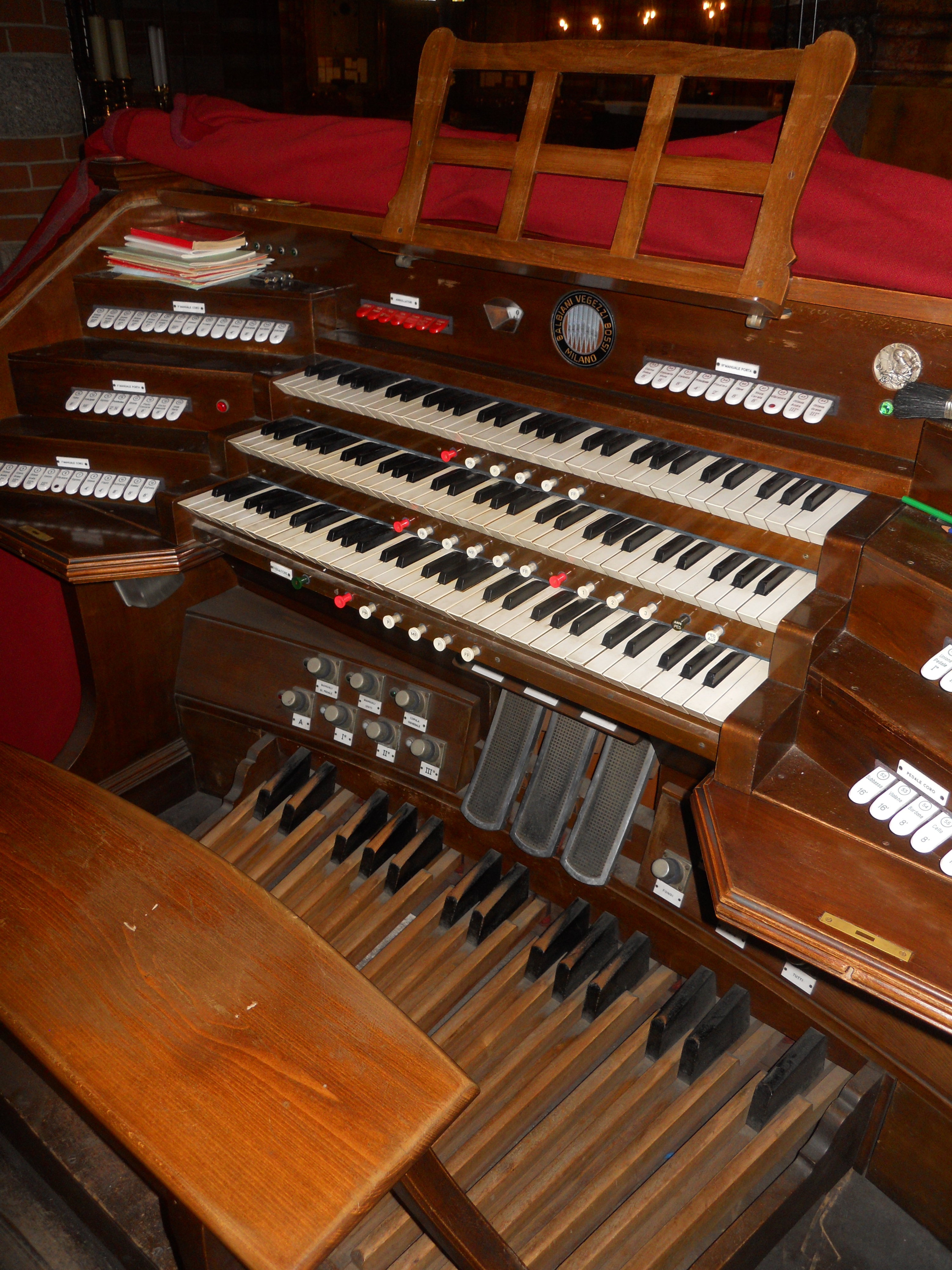 La consolle dell'organo Balbiani-Vegezzi Bossi della chiesa del Santissimo Redentore a Milano